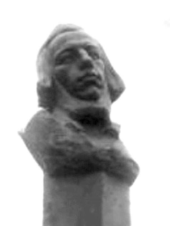 Памятник Добролюбову в Петрограде, скульптор Карл Зале, 1918 год. Фотография из коллекции В. Турчанинова.